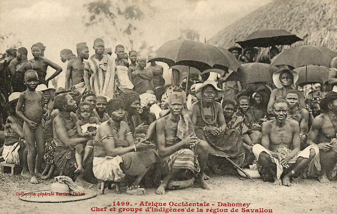 François-Edmond Fortier, Dahomey. Chef et groupe d'indigènes de la région de Savallou. Afrique Occidentale. Dahomey